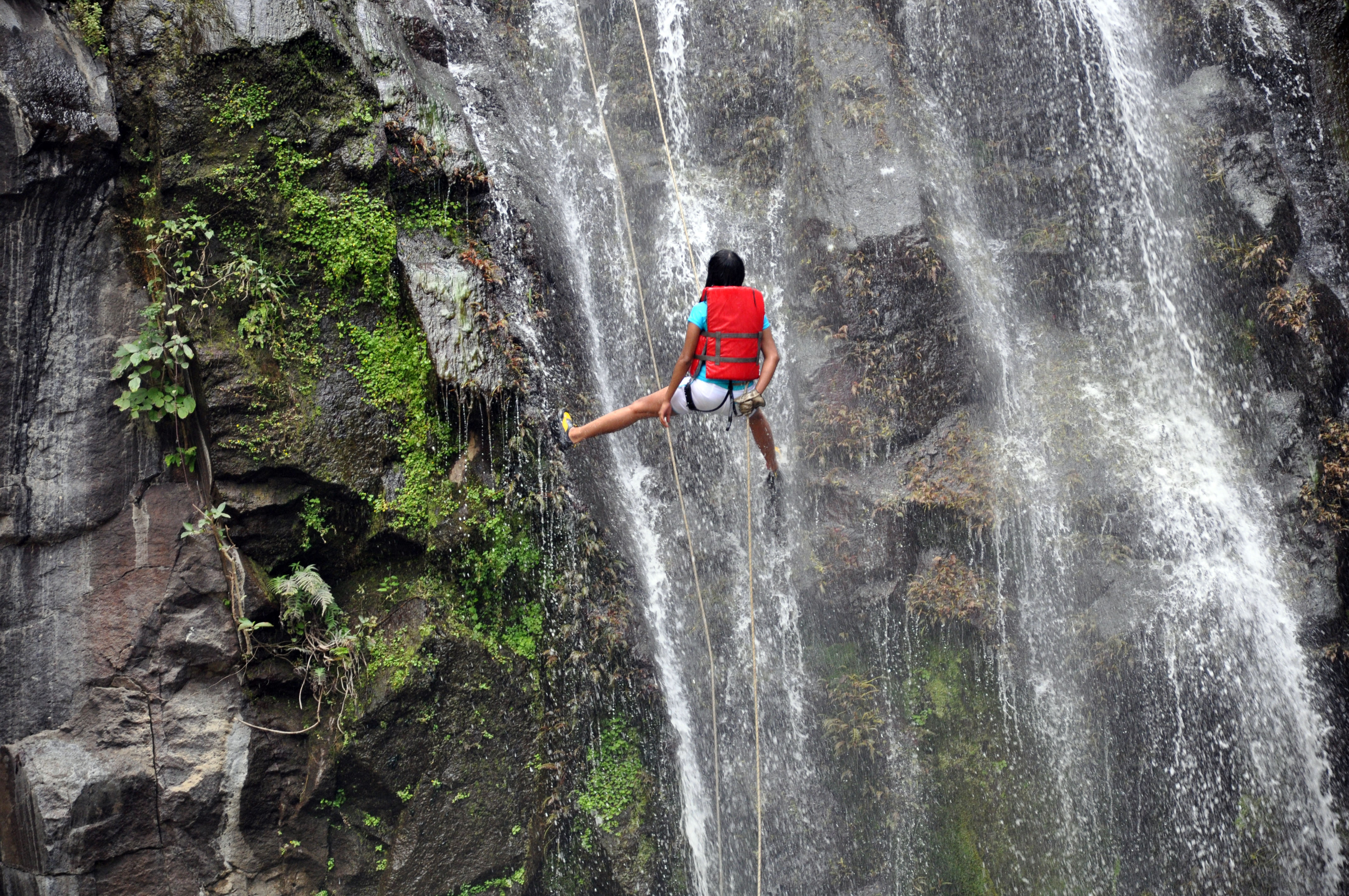 Rappelling down el Salto de la Estanzuela (Estanzuela Cascade)